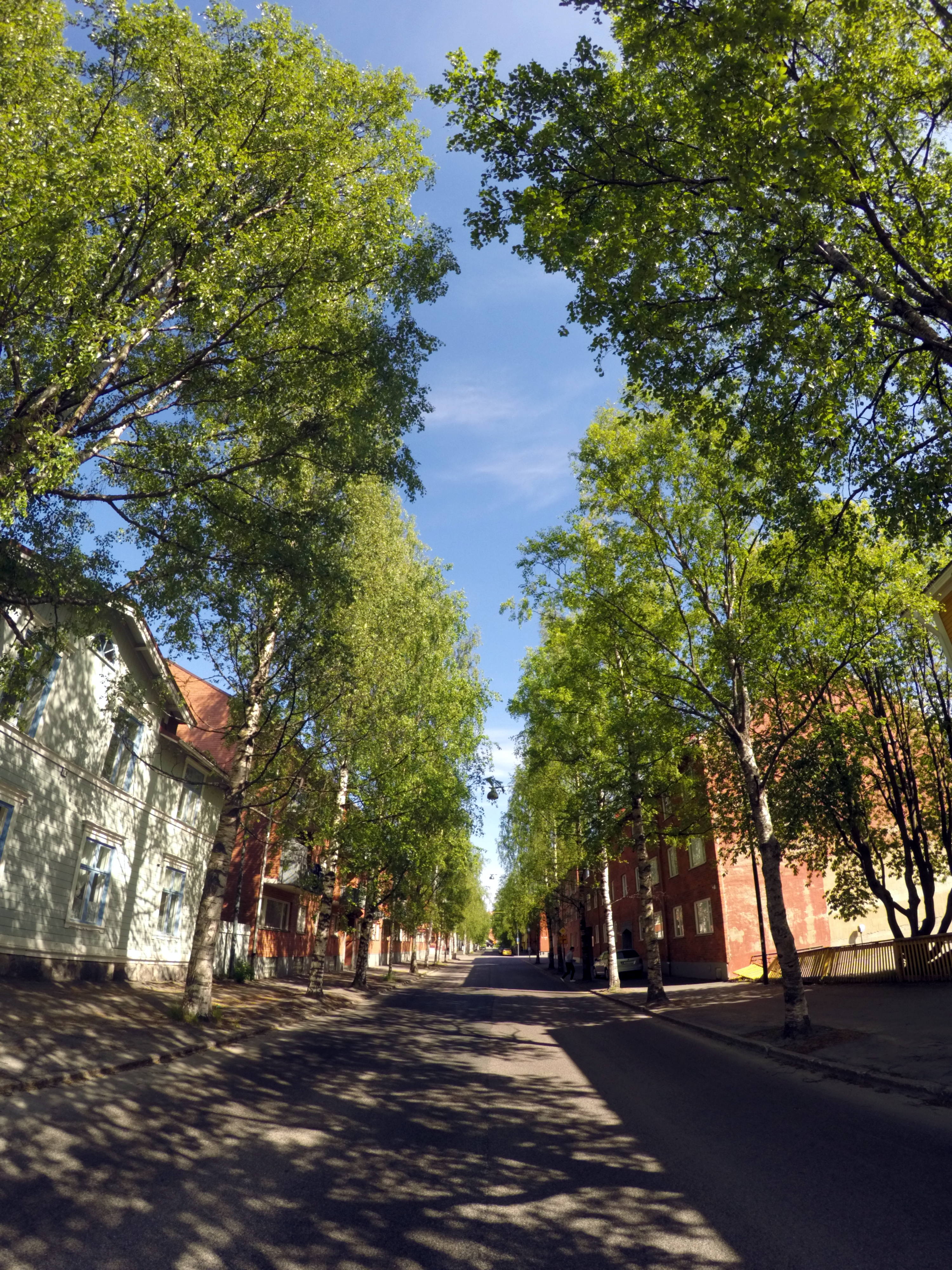 Вулиця в місті Умео, Швеція, червень, 2016 рік